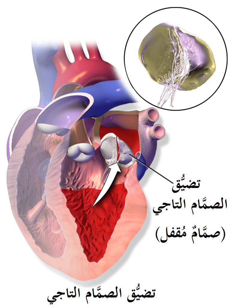 رسمٌ بيانيٌّ يُوضح تضيُّق الصمَّام التاجي.